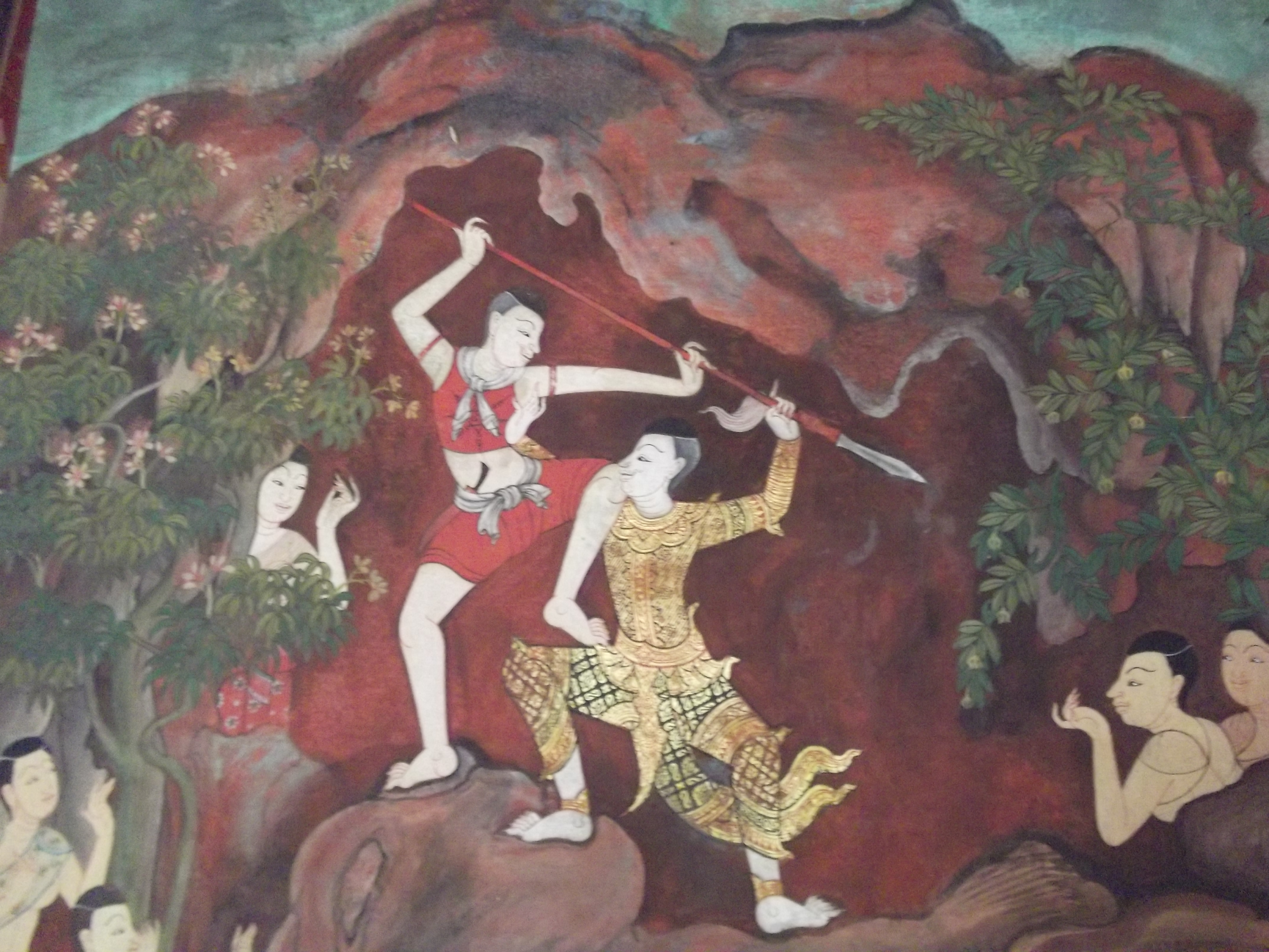 วัดอัมพวันเจติยาราม